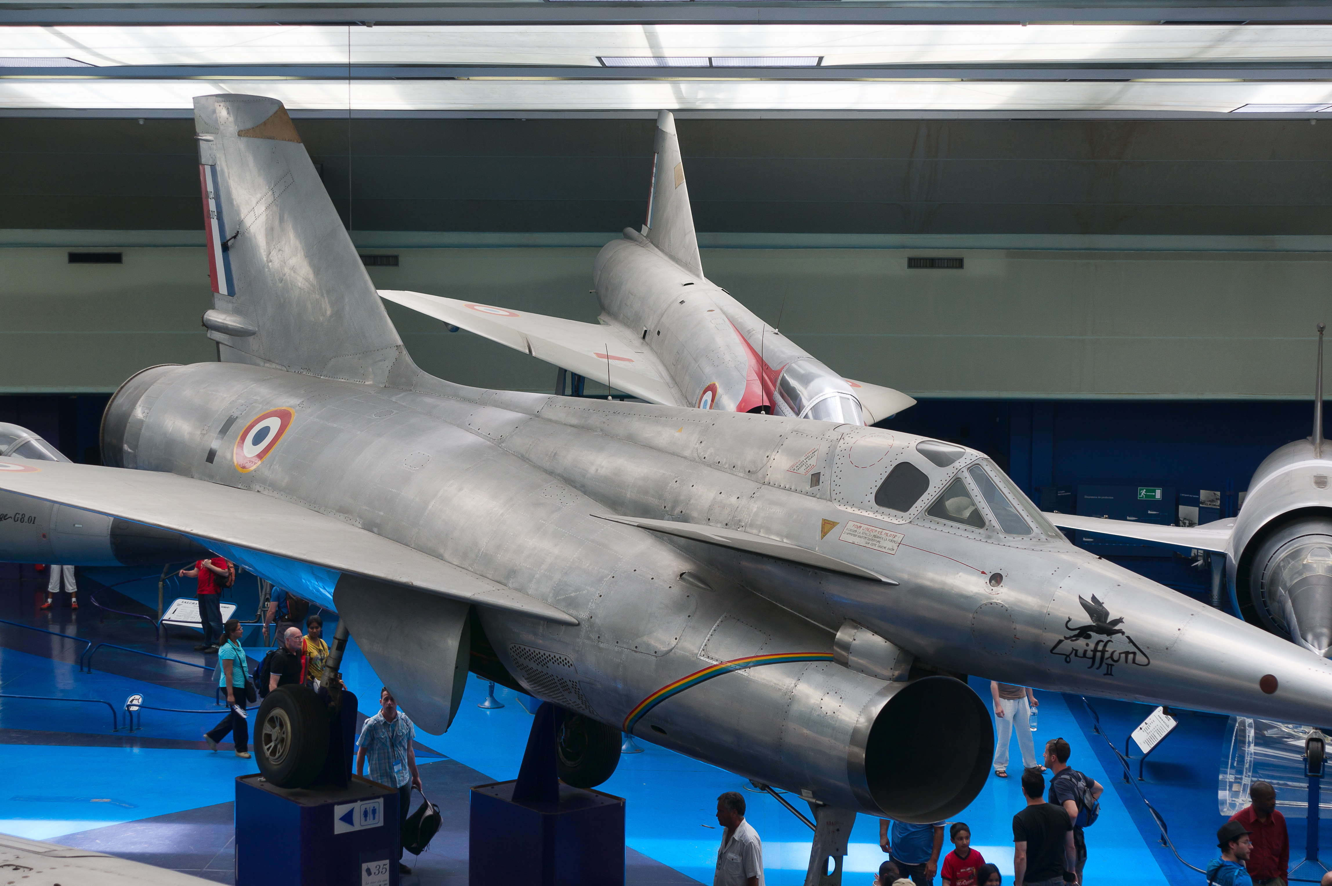 Nord 1500 "Griffon II"